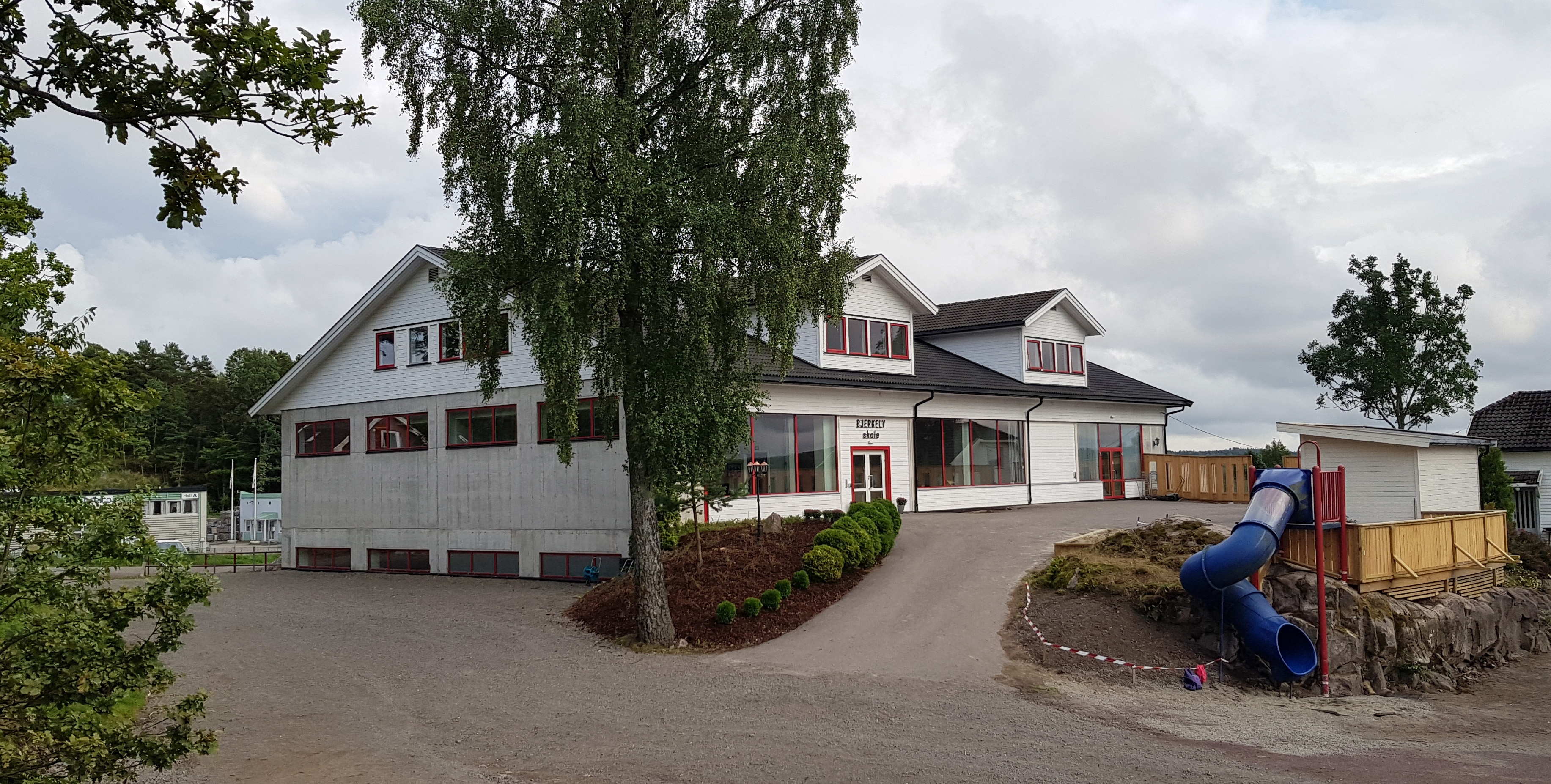 Bjerkely skole, nyåpnet i 2017